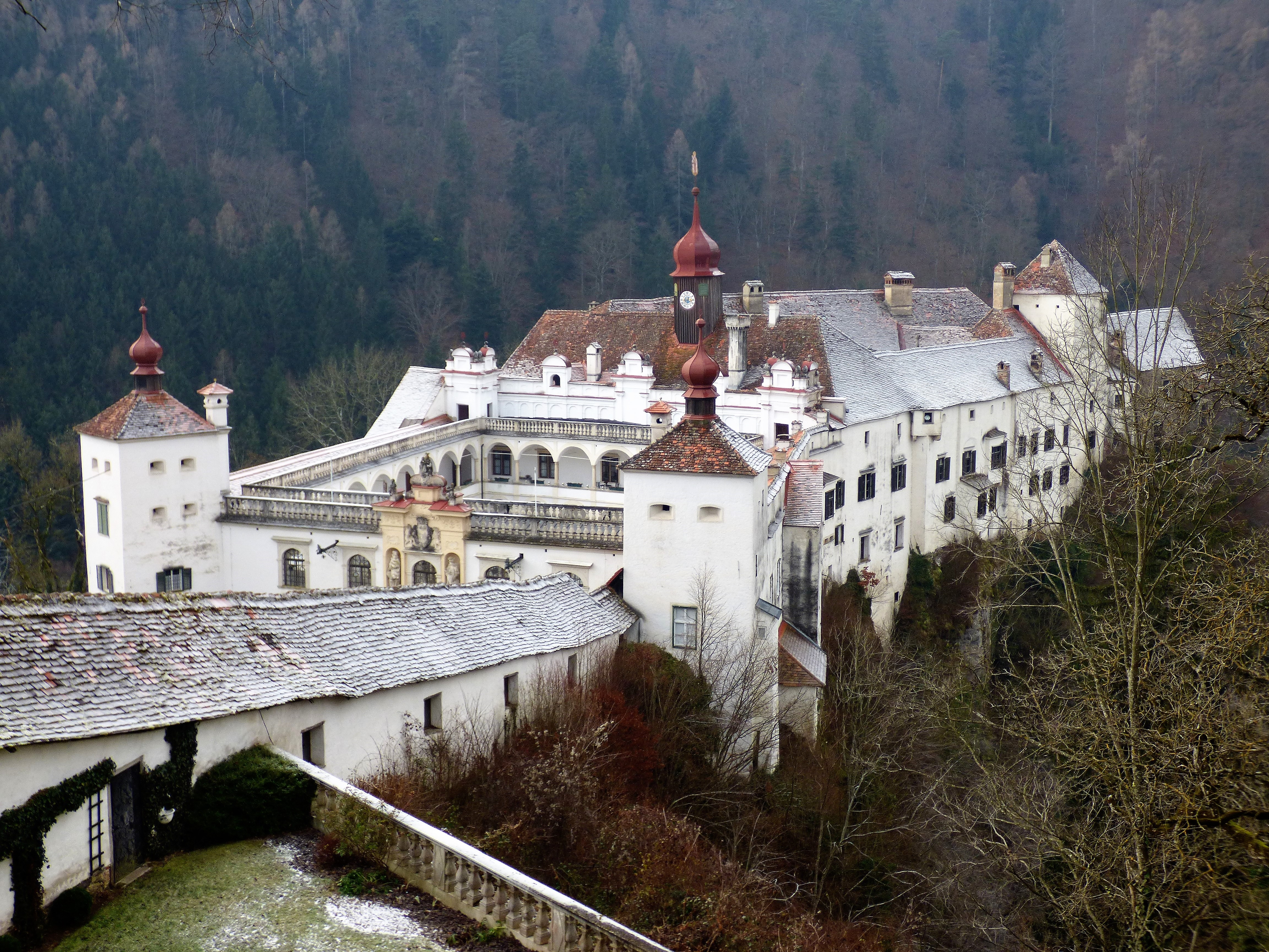 Schloss Herberstein, Ansicht von Ost-Nordost.